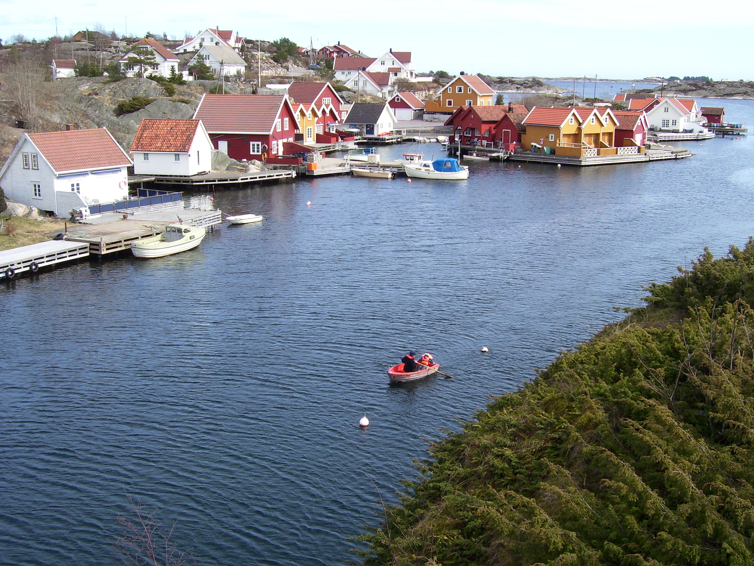 Flekkerøya